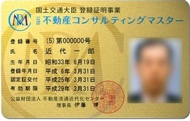 3回目からはゴールドになる